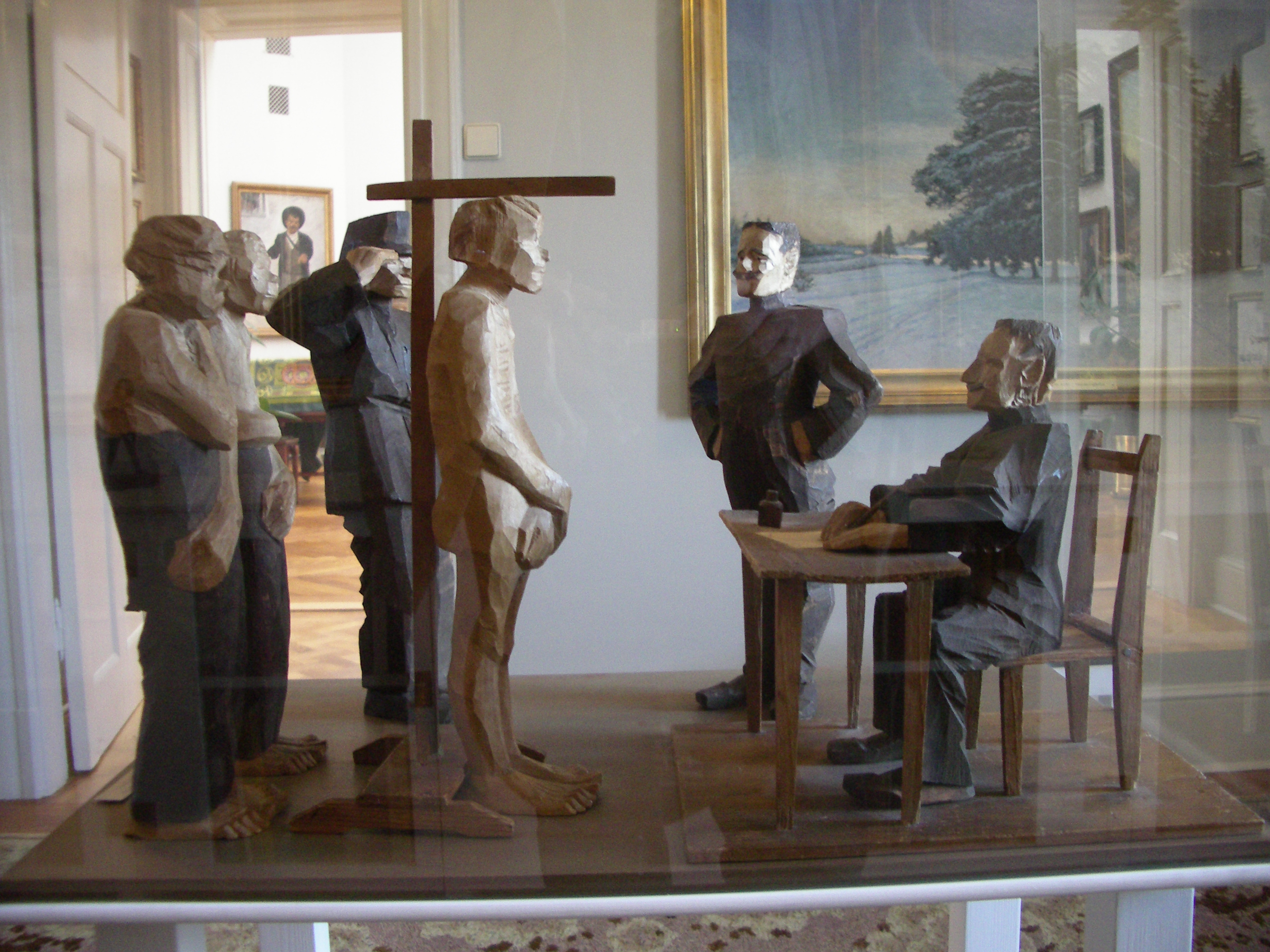 Conscripts´ examination/Beväringsmönstring by Axel Petersson (Döderhultaren, 1868-1925) wooden sculpture